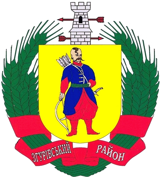 Великий герб Згурівського району